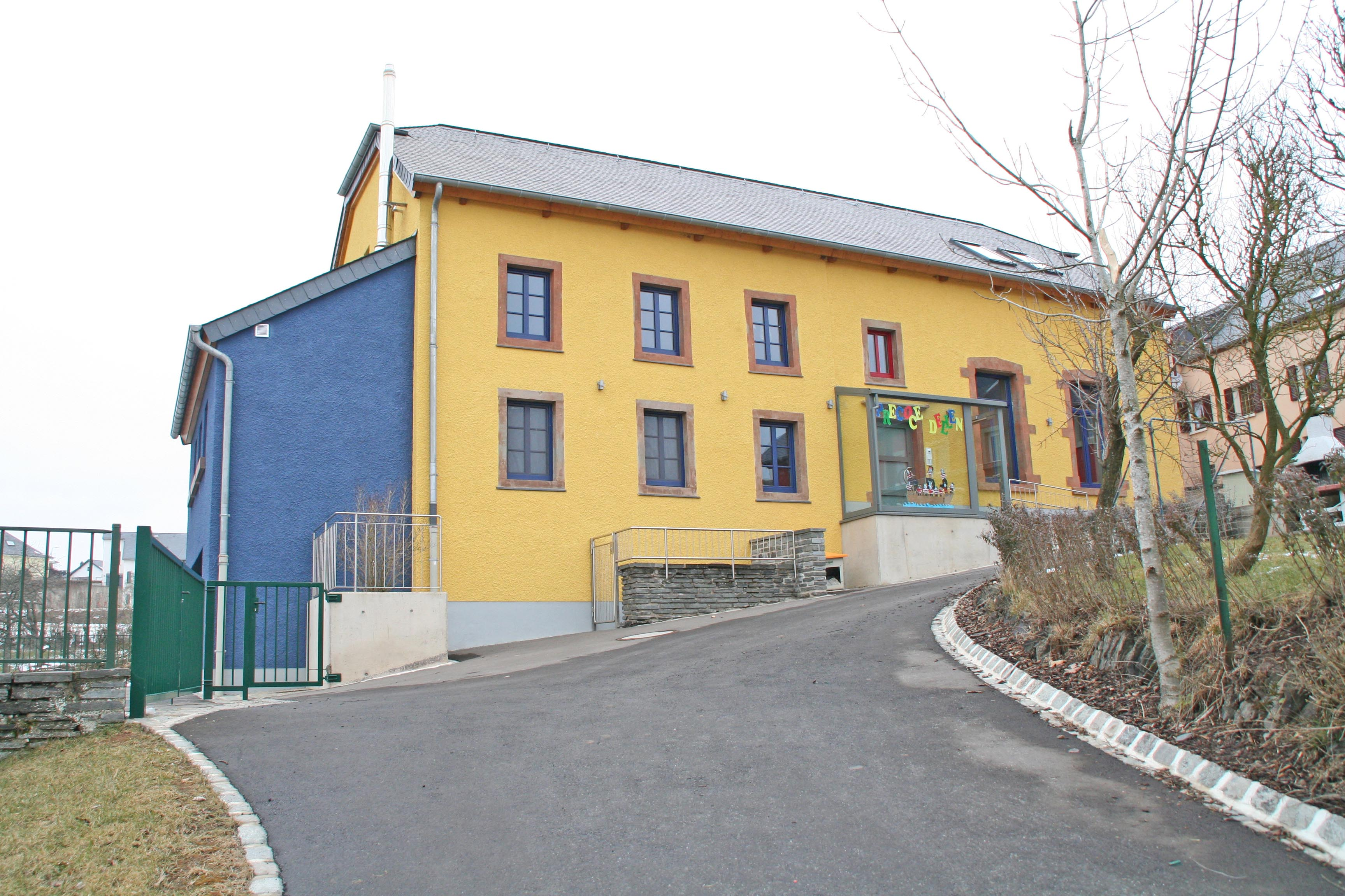 De Précoce zu Dellen. Kategorie:Gemeng Groussbus